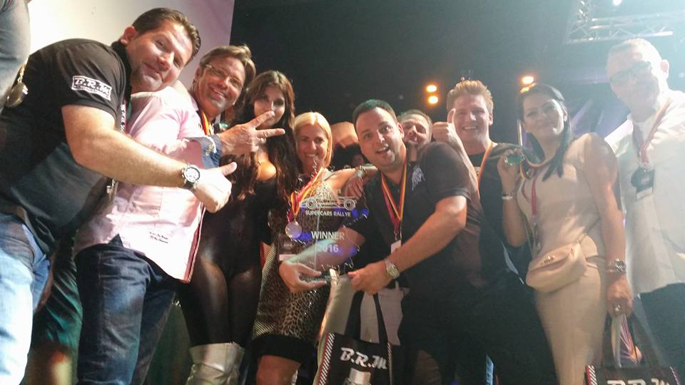 Das Gewinnerteam der GSR 2016